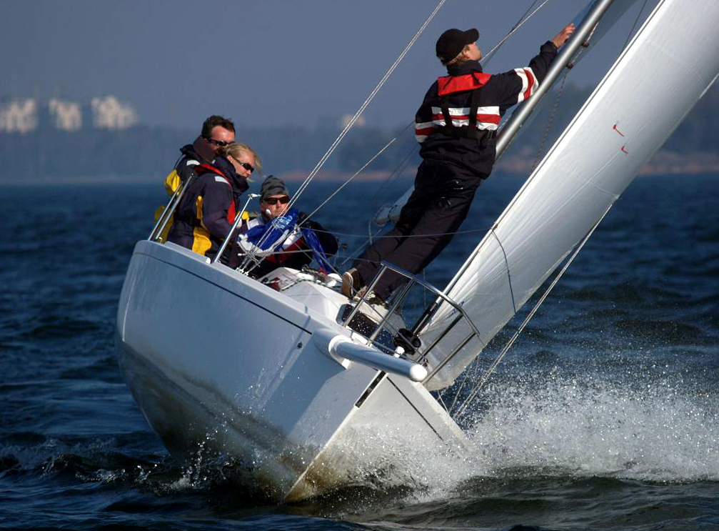 J80, purjehduskilpailu, Suomen Urheiluveneliitto, Helsinki